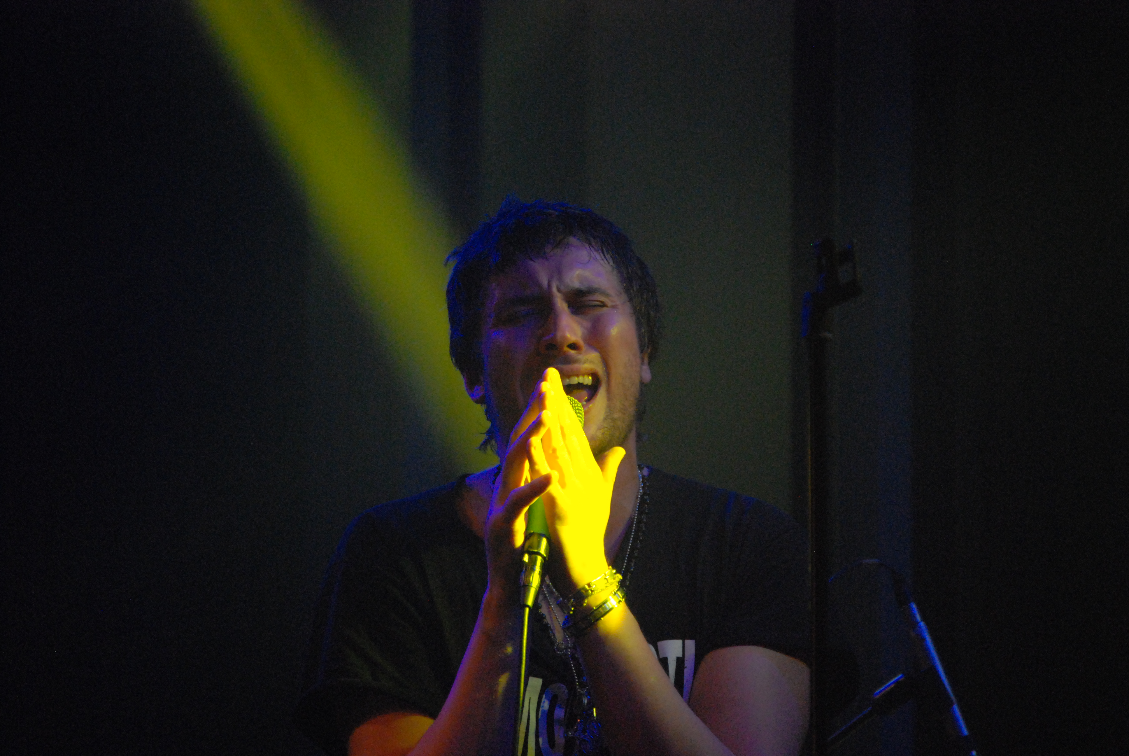 Il Cile (Lorenzo Cilembrini) al Circo Arci Fuori Orario di Taneto, frazione del comune di Gattatico in provincia di Reggio Emilia.